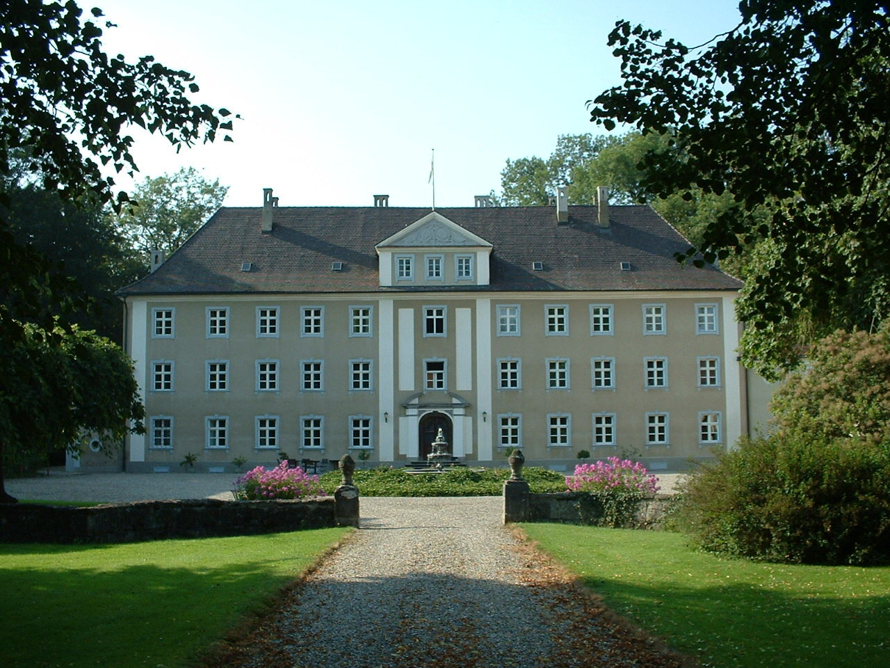 Castle Achstetten